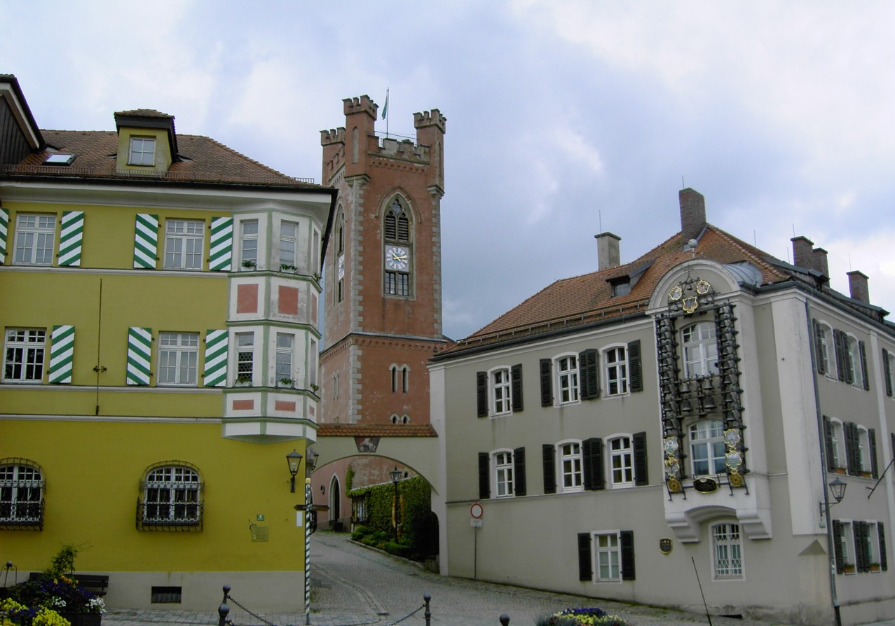 Furth im Wald / Blick vom Stadtplatz zum Stadtturm, rechts im Bild das Amtsgericht mit Glockenspiel am 04.06.2006 selbst fotografiert von Labradormix